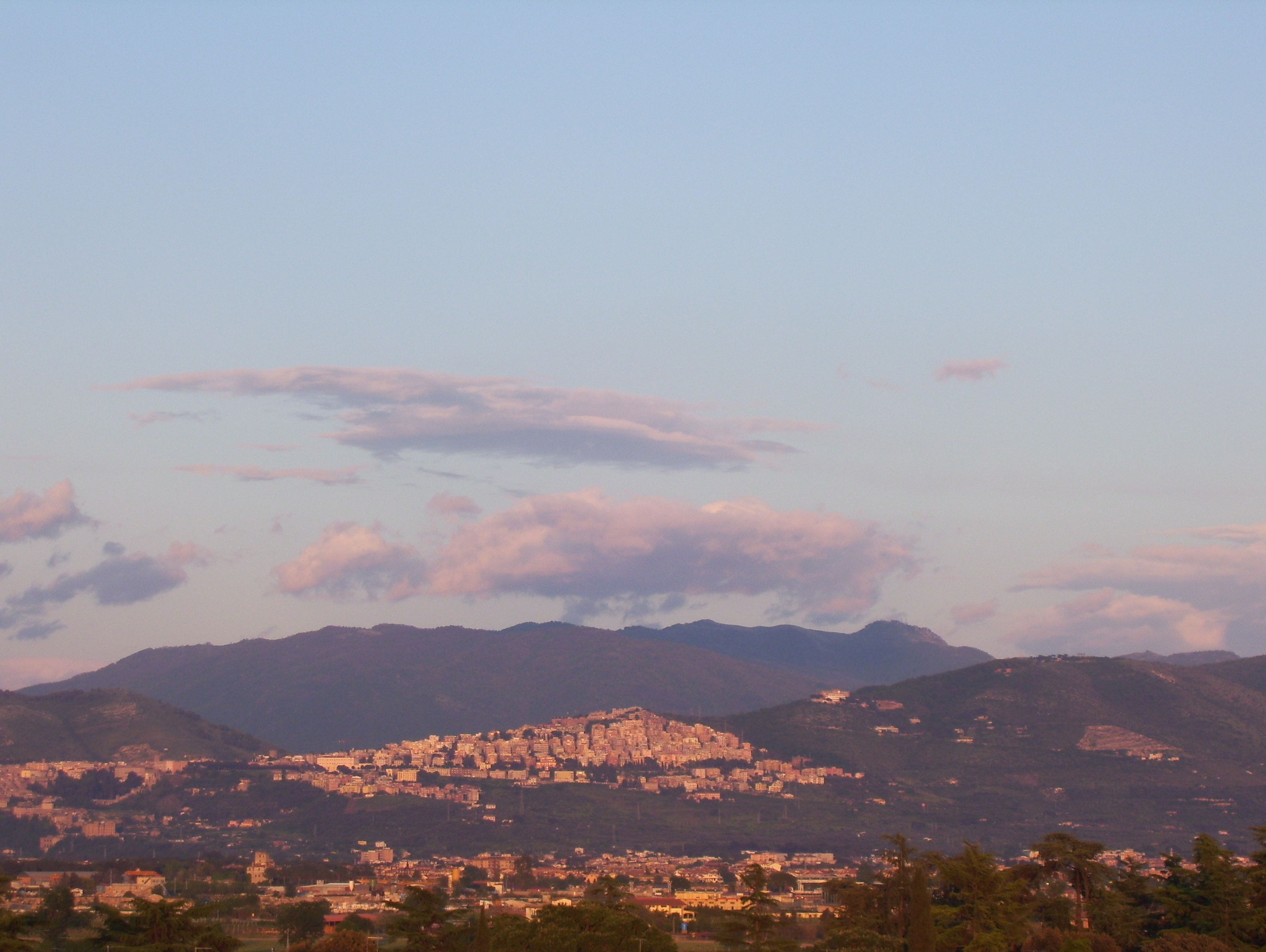 Vista di Tivoli da Guidonia.